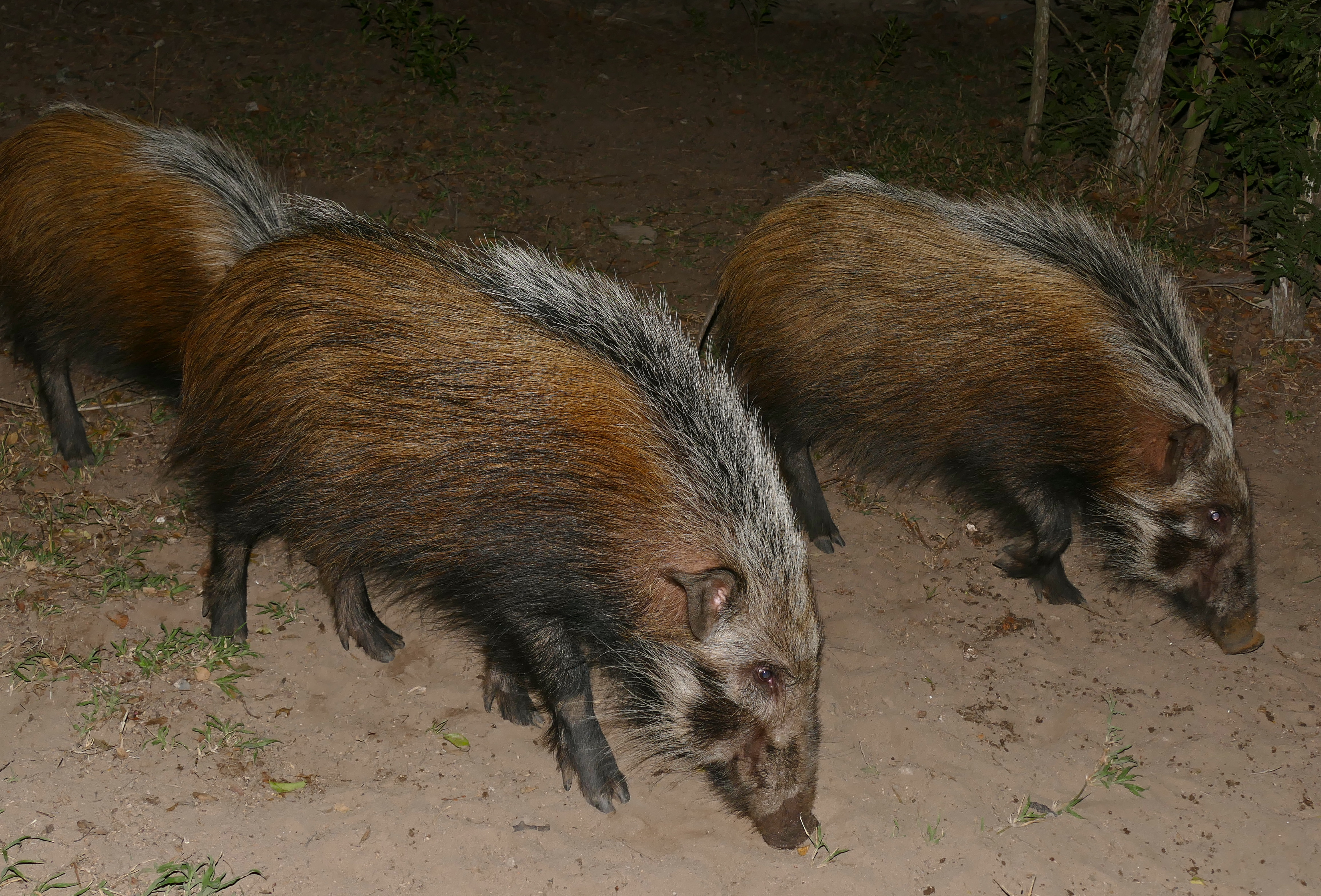 Mpila Camp, iMfolozi Game Reserve, Hluhluwe-iMfolozi Park, Kwazulu-Natal, SOUTH AFRICA